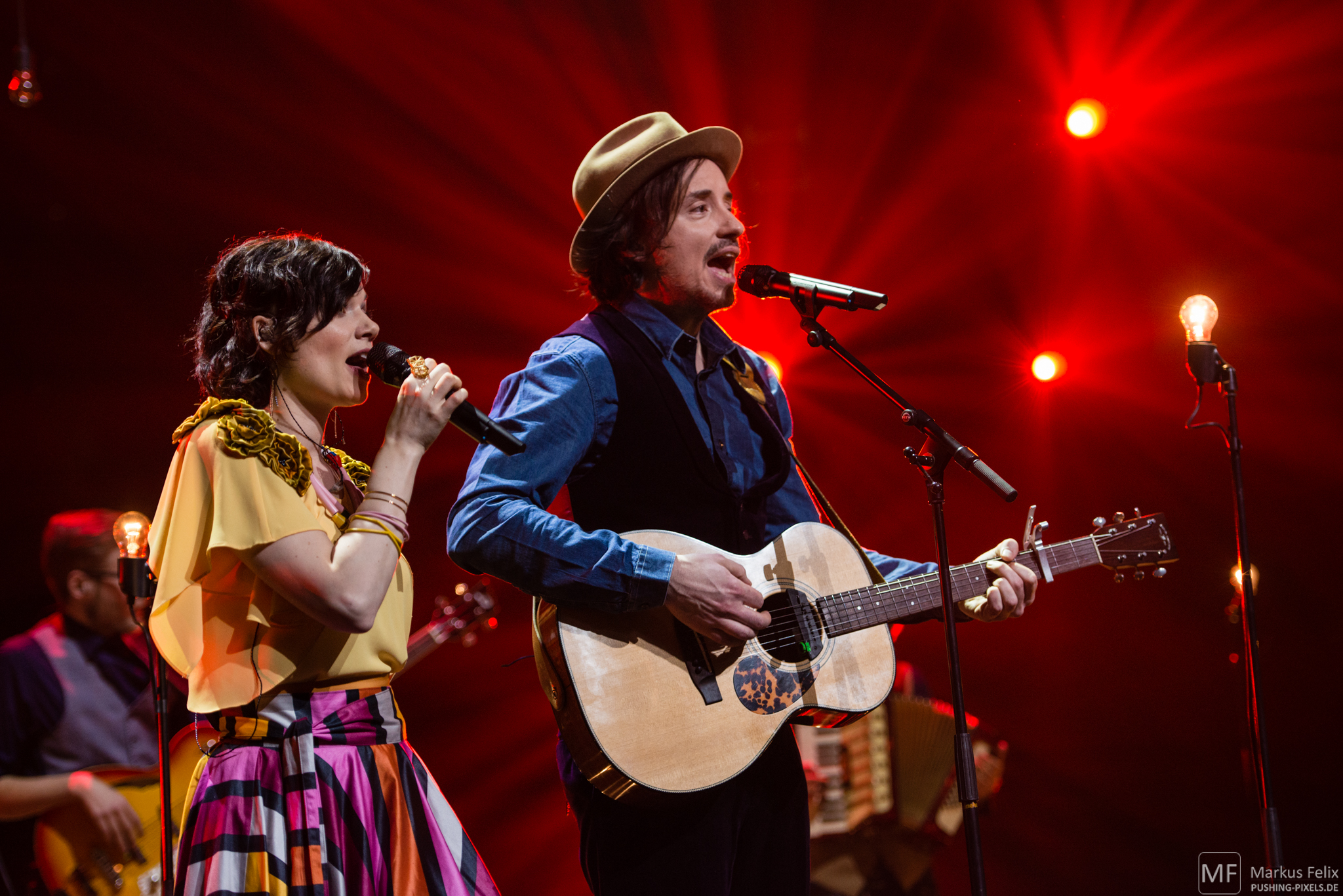 'Eurovision Song Contest 2015 - Unser Song für Österreich': 'Mrs. Greenbird'